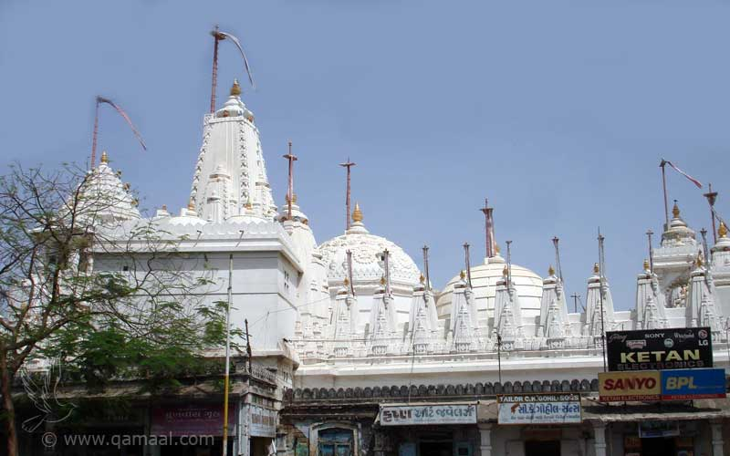 Jamnagar Jain Temple